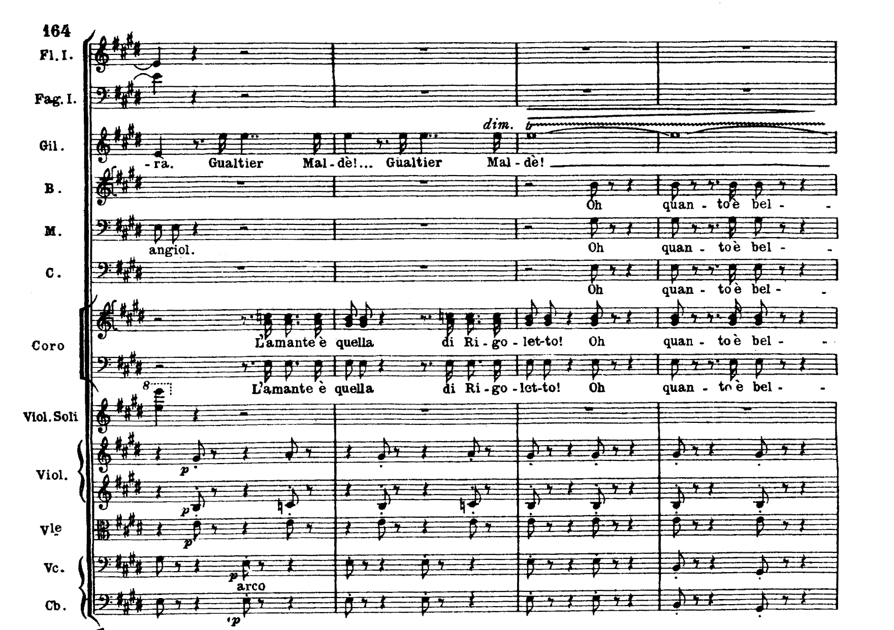 Giuseppe Verdi, Rigoletto (1851), "Caro nome" (ending)